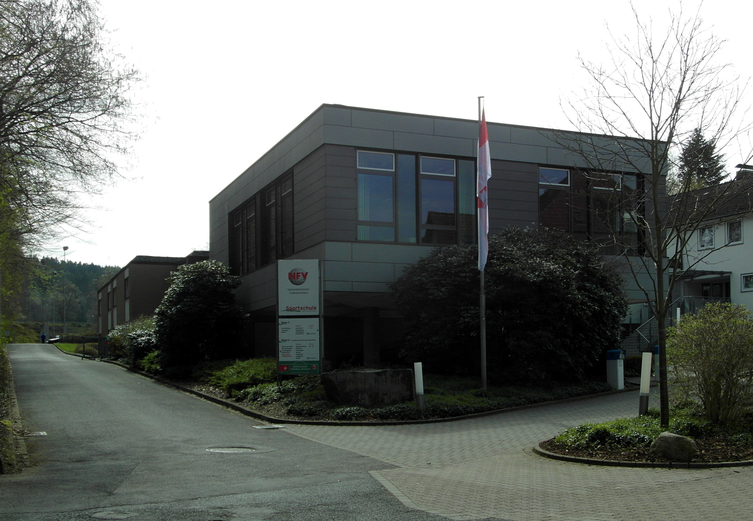 Einfahrt zur NFV-Sportschule Barsinghausen